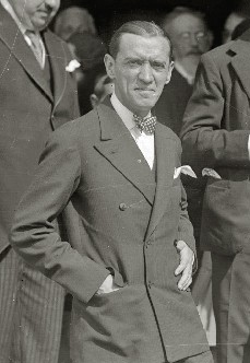 Título original: Diferentes personalidades en el Museo Zuloaga, entre los que se encuentran Gregorio Marañón Posadillo (medico-escritor), Ignacio Zuloaga y Zabaleta (pintor), Ramón Pérez de Ayala (escritor), Juan Belmonte (torero) y Fernando Salazar (concejal de San Sebastián) (1/2) Localización: Zumaya (Guipúzcoa)